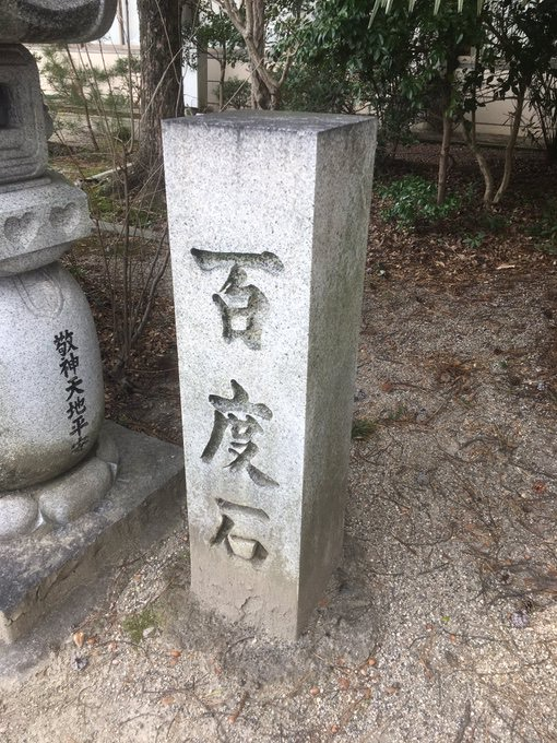 三重県護国神社の百度石